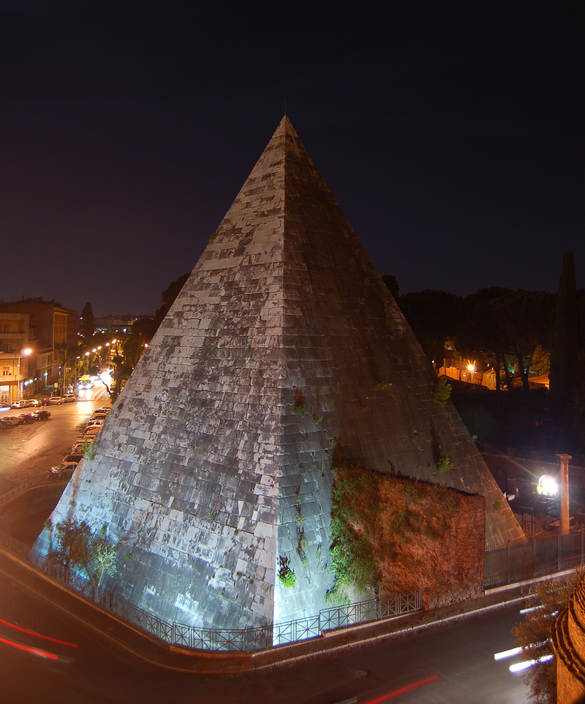 Veduta notturna della Piramide Cestia a Roma, ripresa dalla torre di Porta San Paolo.